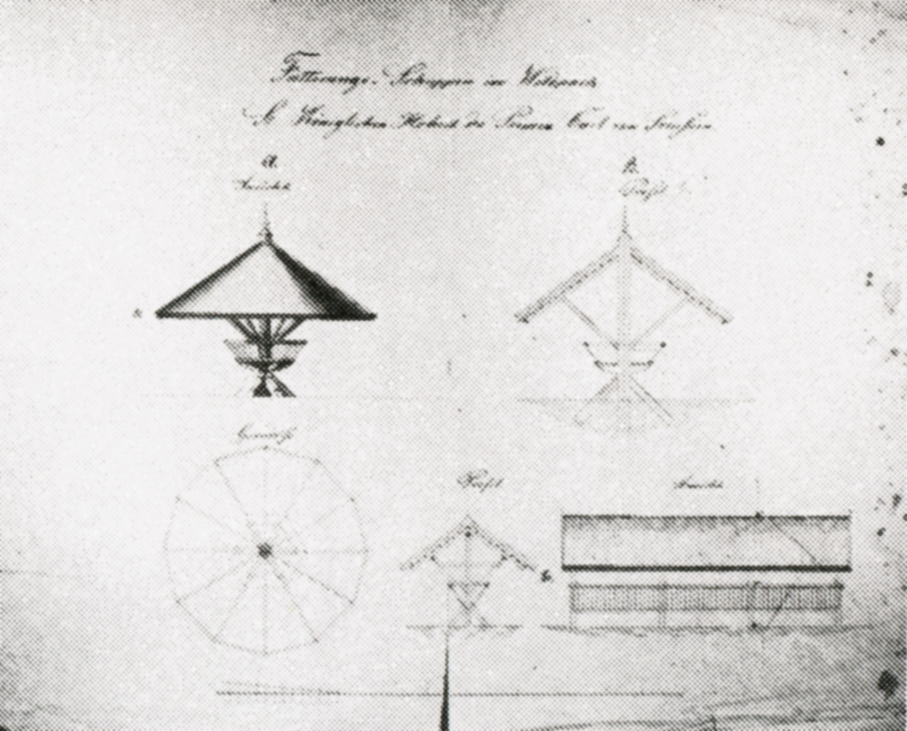 Ludwig Persius?: Wildfutterschuppen Klein-Glienicke